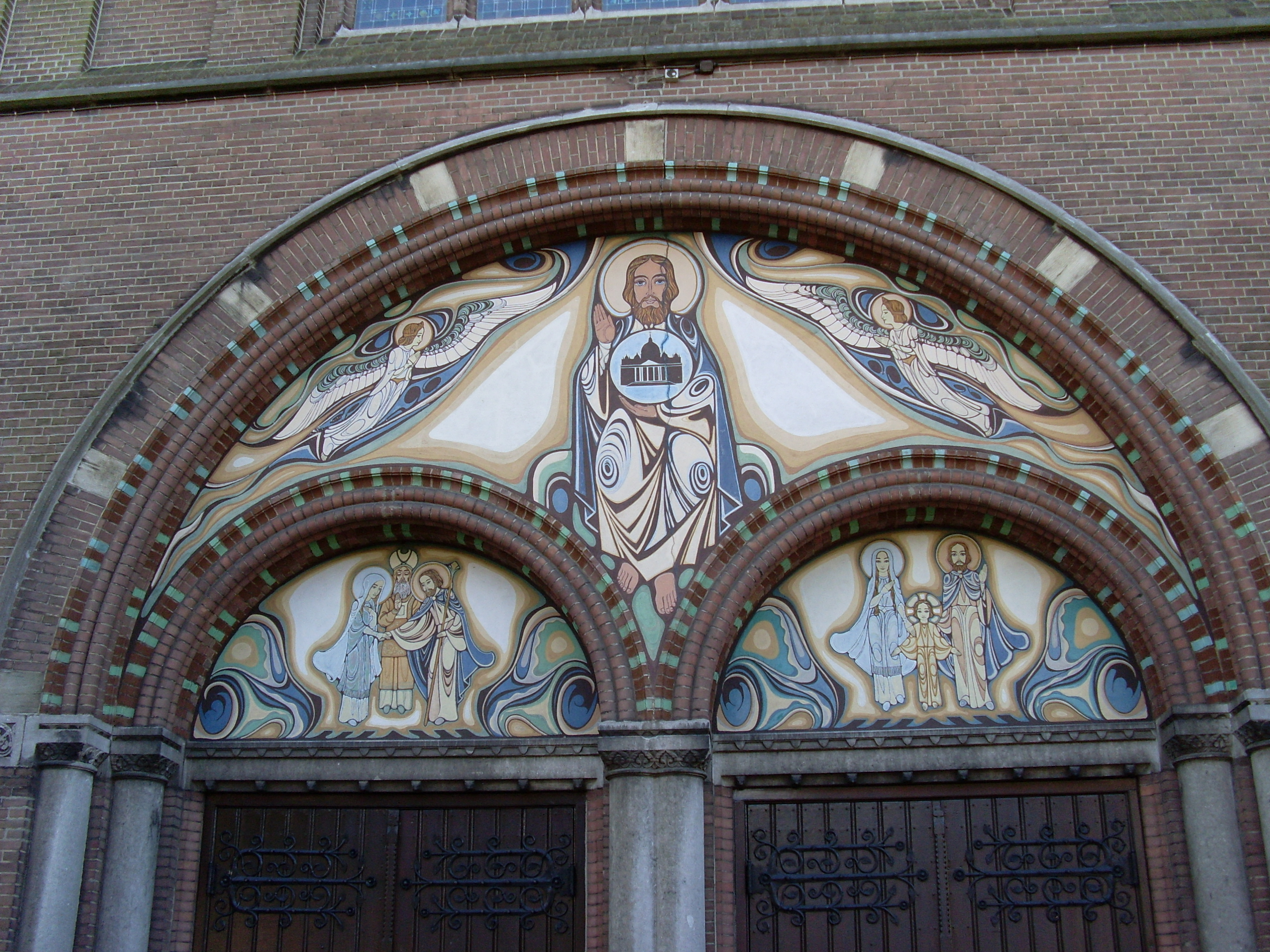 St Jozefkerk Nijmegen detail